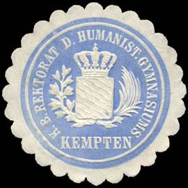 Sealing stamp Title: Königlich Bayerische Rektorat des Humanistischen Gymnasiums - Kempten Description: hellblau, weiß, geprägt Place: Kempten size: 4 cm